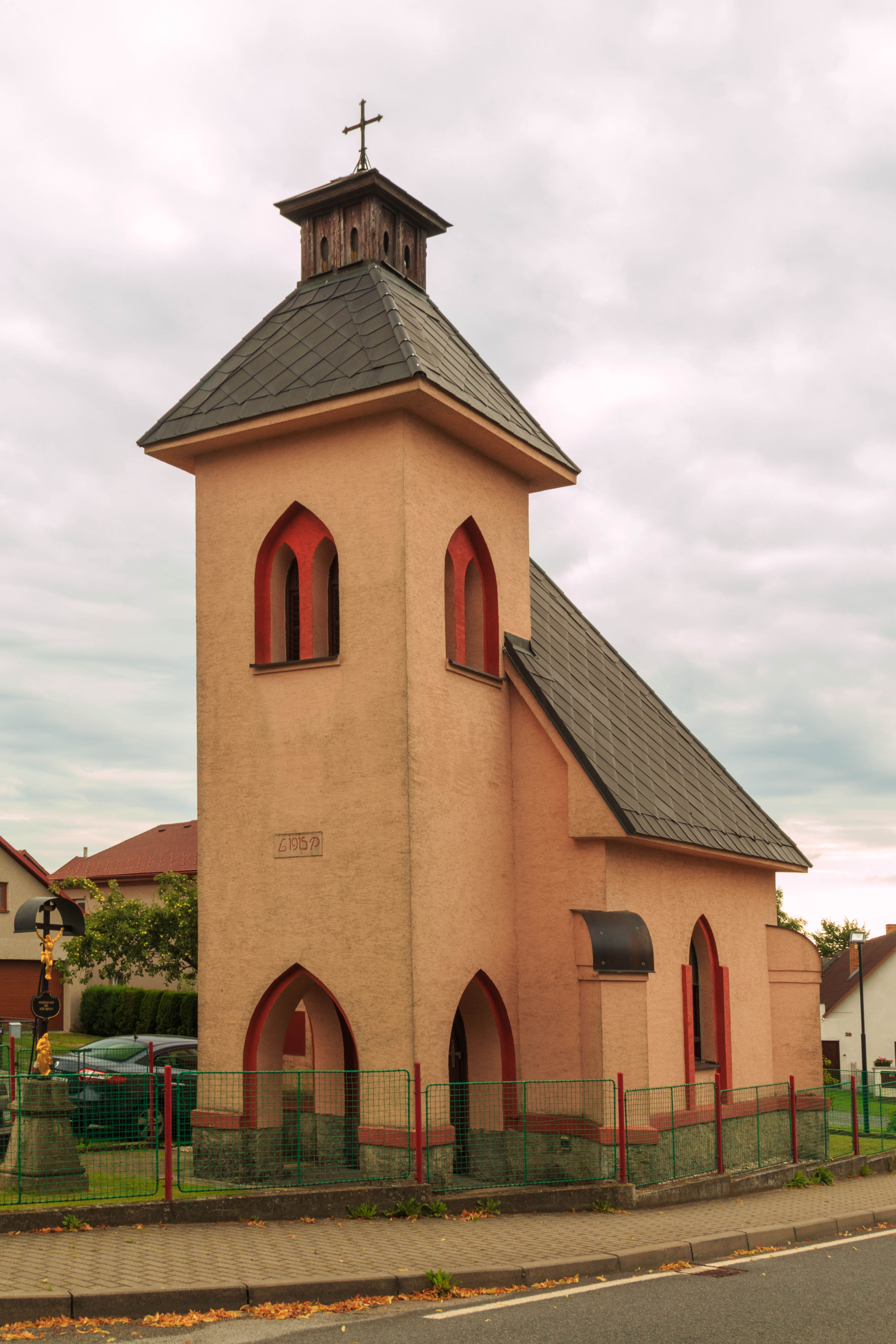 Sedletín kaple